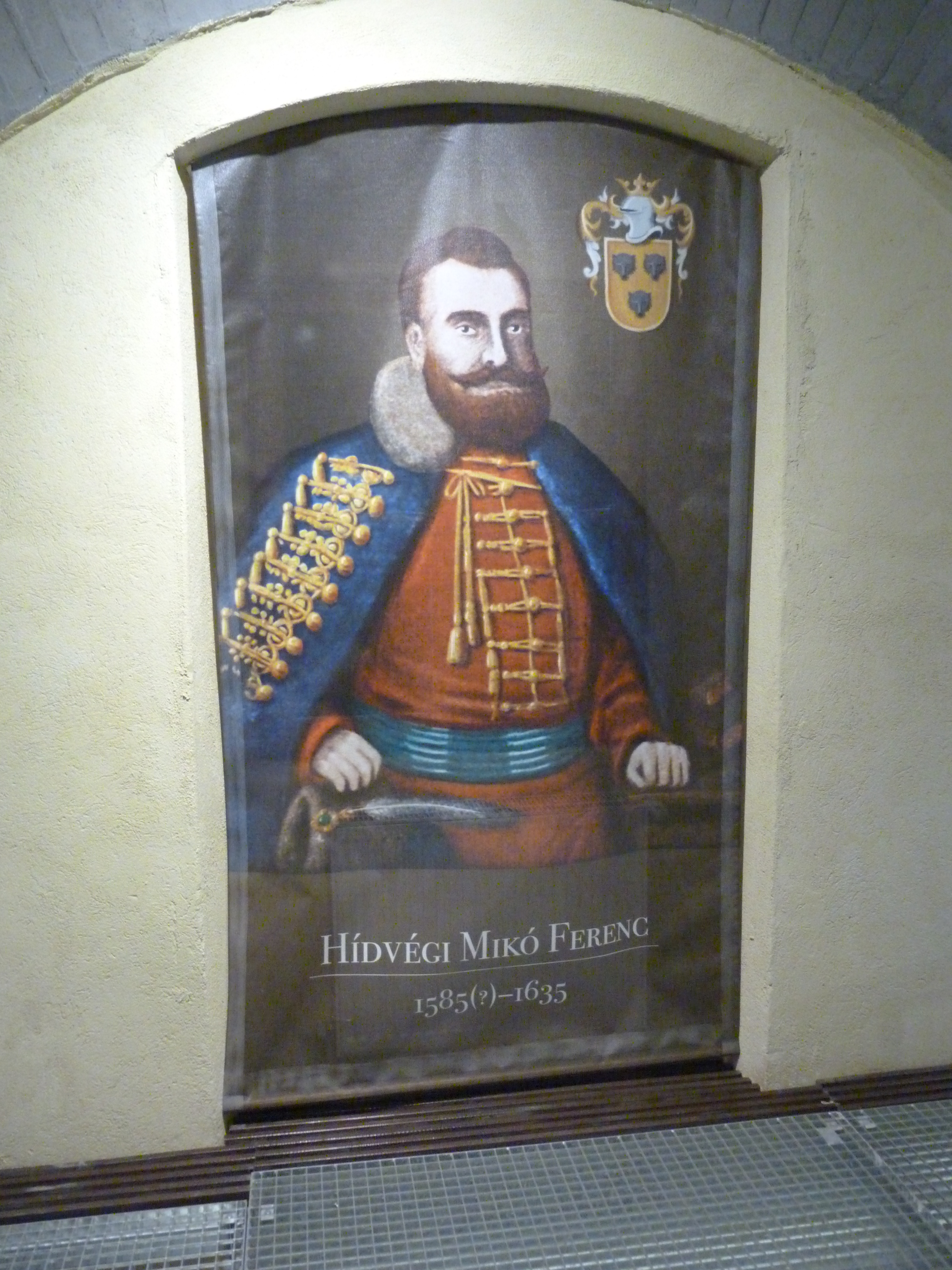 A felvétel 2013.június 19 -én készült Csíkszeredában, a Mikó várban. Csíkszereda legrégibb épületének építtetője, Hídvégi Mikó Ferenc 1611-től Csíkszék alkapitánya, ám kinevezését a csíki székelyek nem szívesen fogadták. Kifogásuk, amely inkább ürügynek tűnik, az volt, hogy az alkapitány nem rendelkezik helyben sem lakással, sem jószággal, sem földdel. Az itteniek húzódozásának oka lehetett Mikó unitárius vallása, valamint nem csíki, "külföldi" származása. Az új fejdelem, Bethlen Gábor 1613-ban a fiatal és energikus Mikót, Csíkszék főkapitányává nevezve ki, saját korábbi tisztségére érdemesítette. Fiatal korától a fejedelem feltétlen híve, a középnemesség soraiból emelkedett fel a nagyságos urak közé. 1622-től tanácsúr, kincstárnok, majd udvarmester. Ifjú korában írt krónikája éles szemű megfigyelőre vall. Bethlen Gábor legjártasabb diplomatái közé tartozott, emellett a 17. század eleji erdélyi politikai élet kiemelkedő egyénisége volt. A csíkszeredai Mikó-várat, amelyet akkor Mikó-újvárnak hívtak, 1623. április 26-án kezdte a főkapitány építtetni. Feltételezhető, hogy az óolasz stílusú várkastély építésénél közreműködött az olasz Giacomo Resti, aki 1615-1634 között mint udvari építész Erdélyben dolgozott. A mintegy 75x70 m alapterületű, négyszögletes főúri kastély építését valószínűleg a 17. század harmincas évében fejezték be. Stílusa alapján az épület leginkább a radnóti, az alvinci és a szárhegyi várkastélyokkal rokonítható. A Csíki Székely Múzeumnak ad otthont az épület. ©© Derzsi Elekes Andor, Budapest, 2013, You are authorised to use this photo under Creative Commons – even for commercial, for profit purposes. The photo must be attributed to Derzsi Elekes Andor. All of the photos and vids in the Metapolisz DVD line are under Creative Commons and can be used even for commercial – for profit – purposes. Recommended Citation Derzsi Elekes Andor: Metapolisz DVD line Time: mashine time + 1 hour.